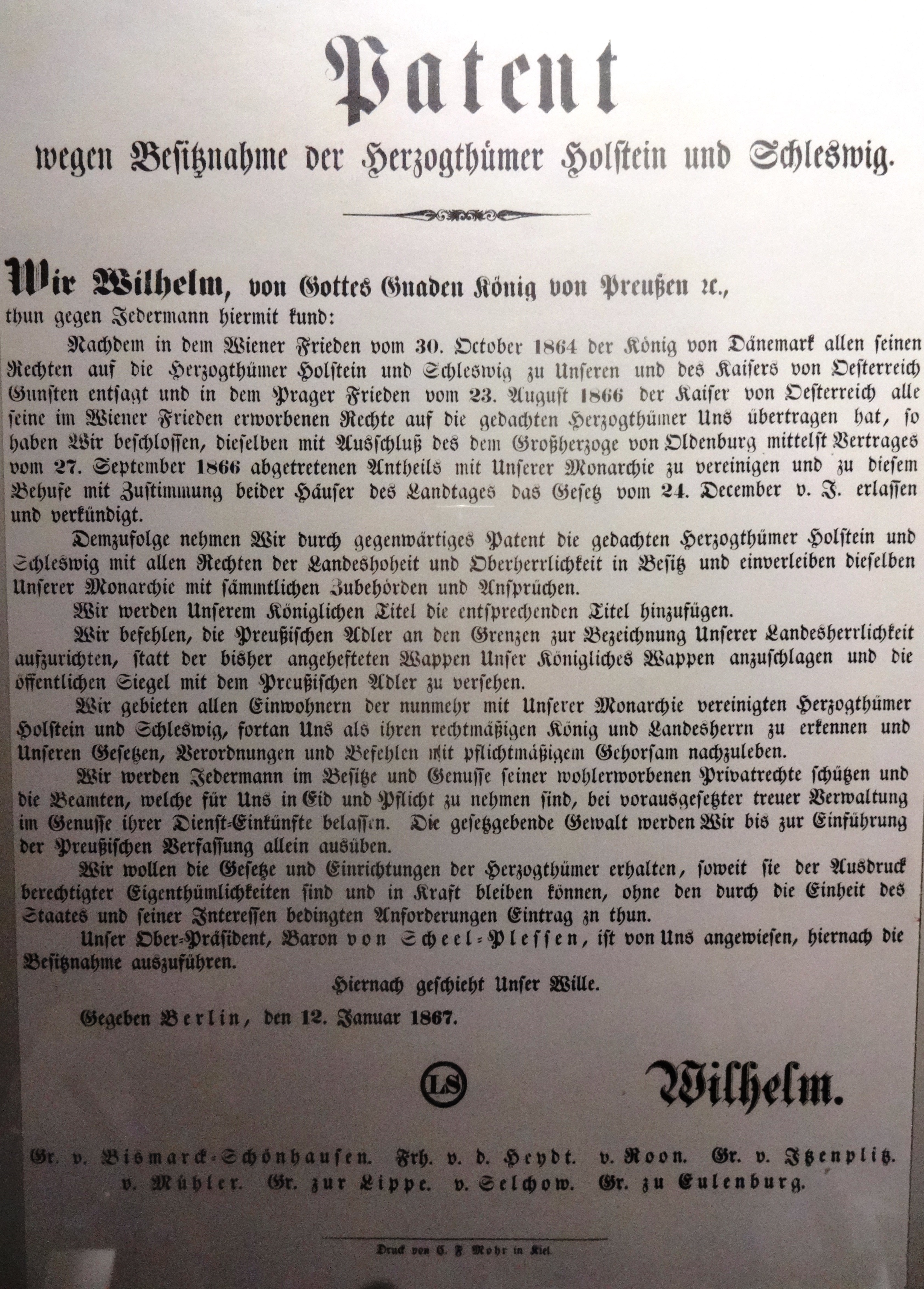 Annexionserklärung des preußischen Königs von 1867